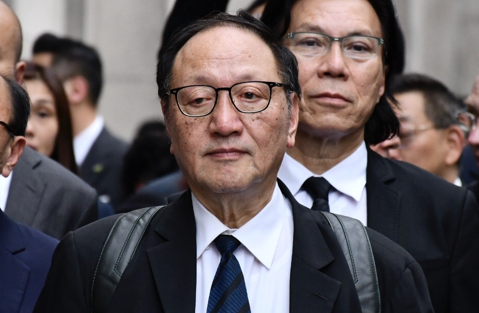 香港法律界選委查錫我 (攝影：美國之音湯惠芸）